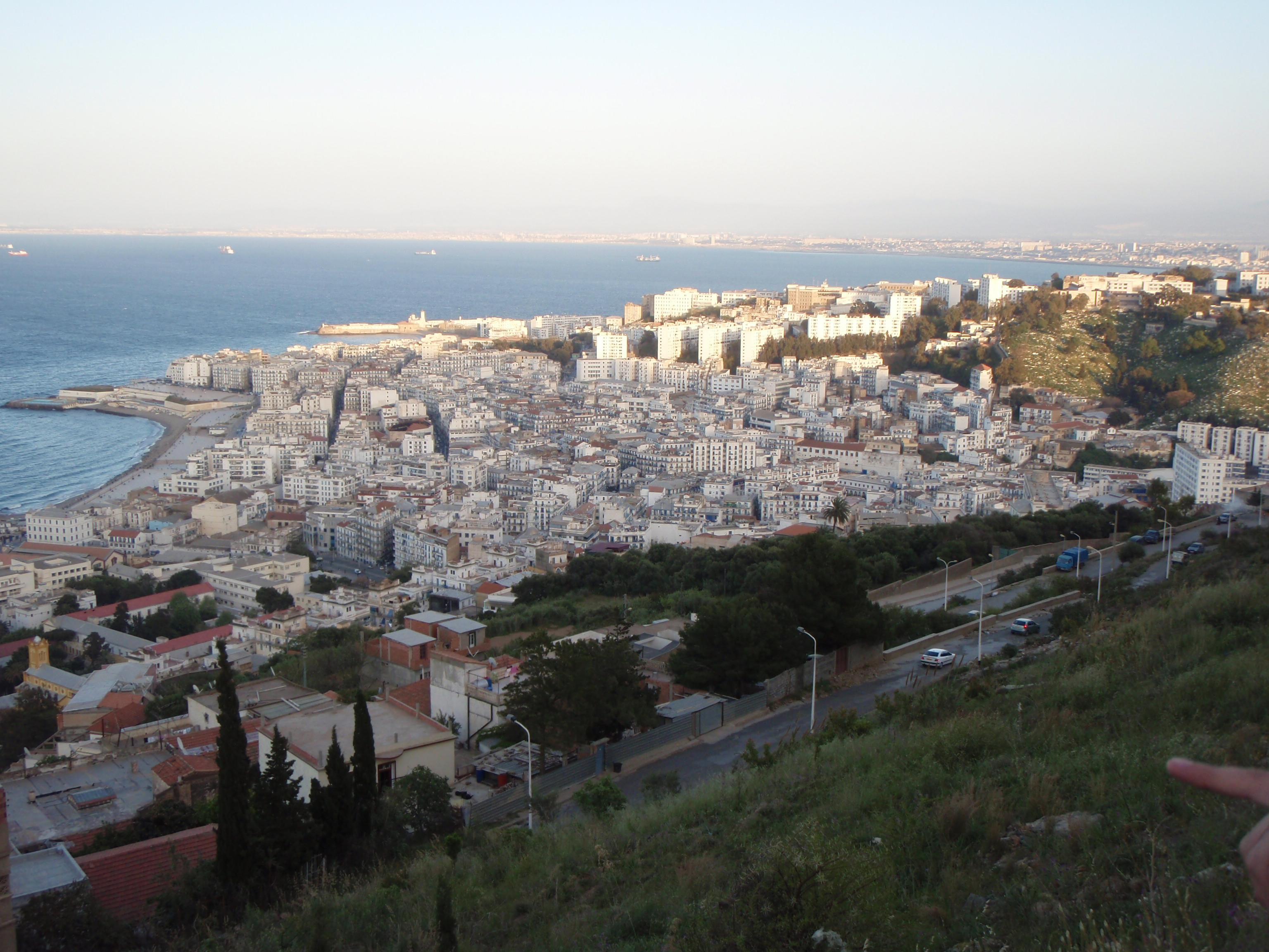 Bab El Oued vue depuis les hauteurs de Notre-Dame d'Afrique.